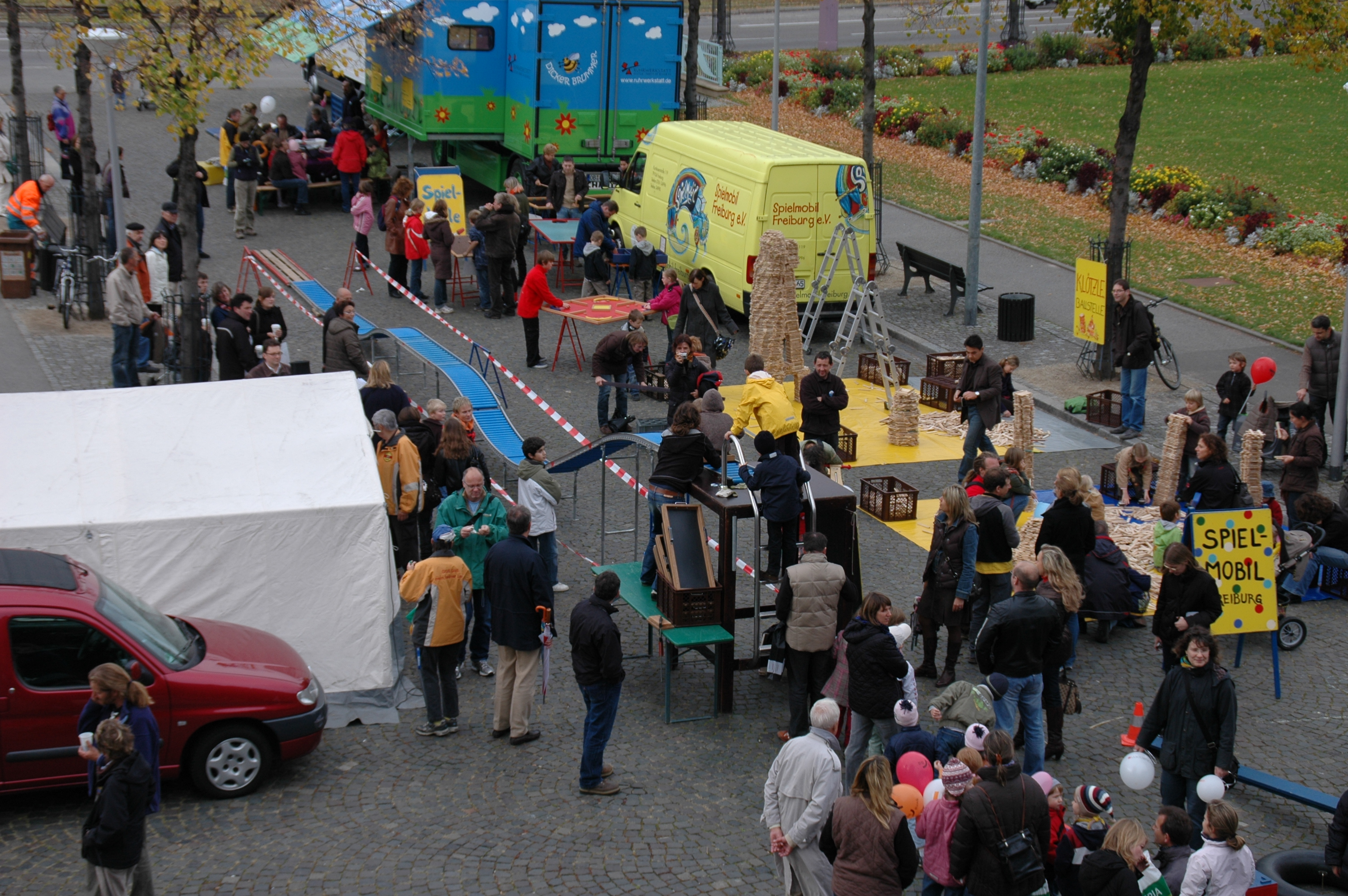 Spielfest am Mannheimer Wasserturm im Rahmen des 37. Internationalen Spielmobilkongresses 2008